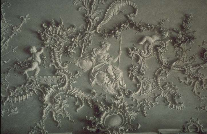 Photo personnelle